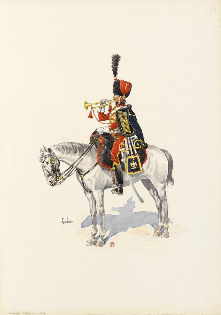 Trompette du 4e Hussards en 1809.